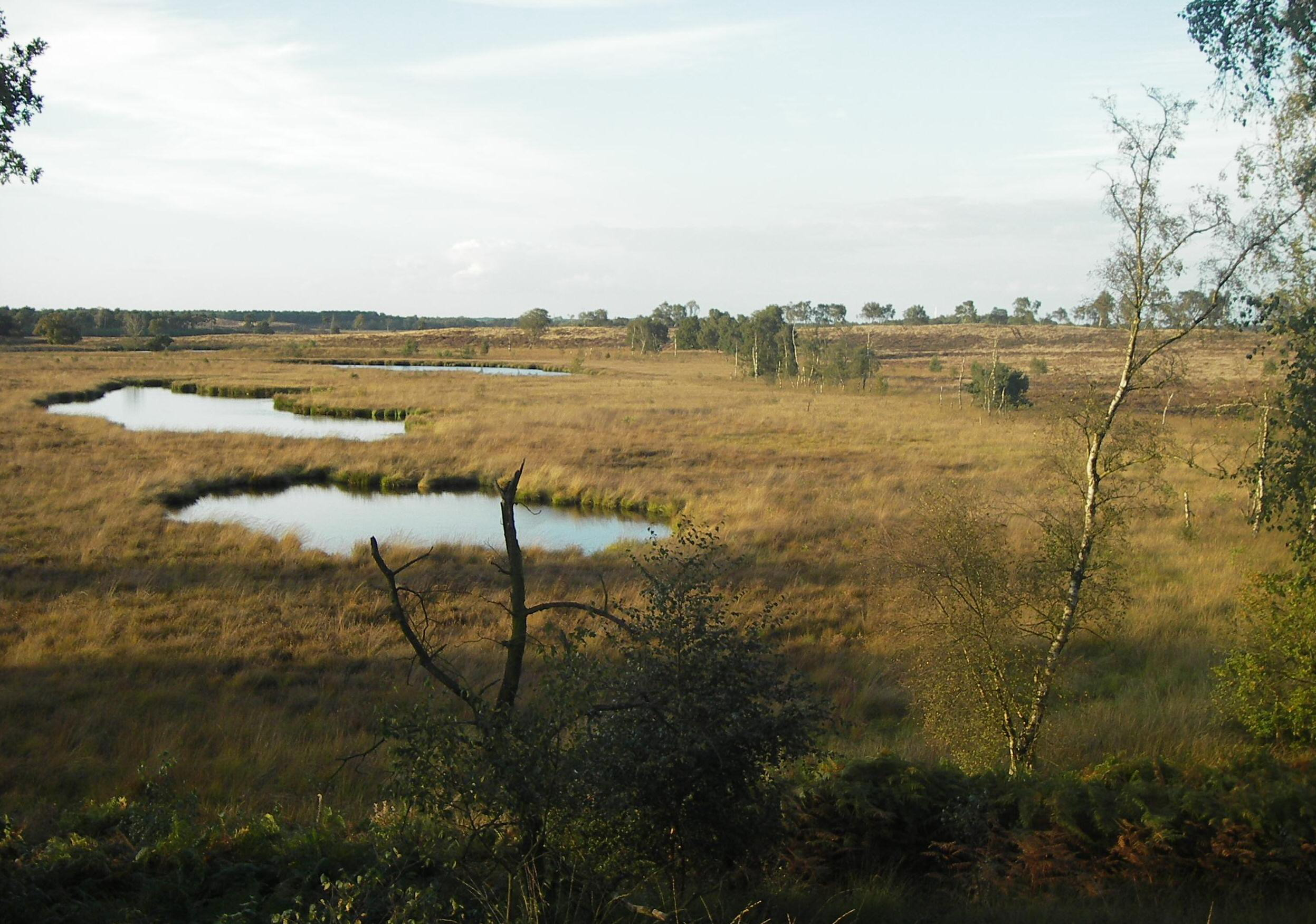 Het Pikmeeuwenwater, een ven op de Looijerheide in de Hamert.